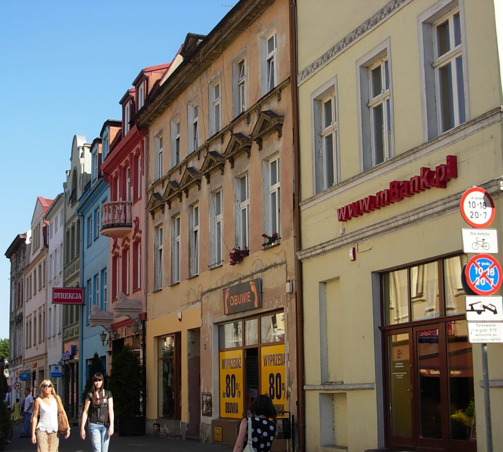 Ulica Magdzińskiego w Bydgoszczy